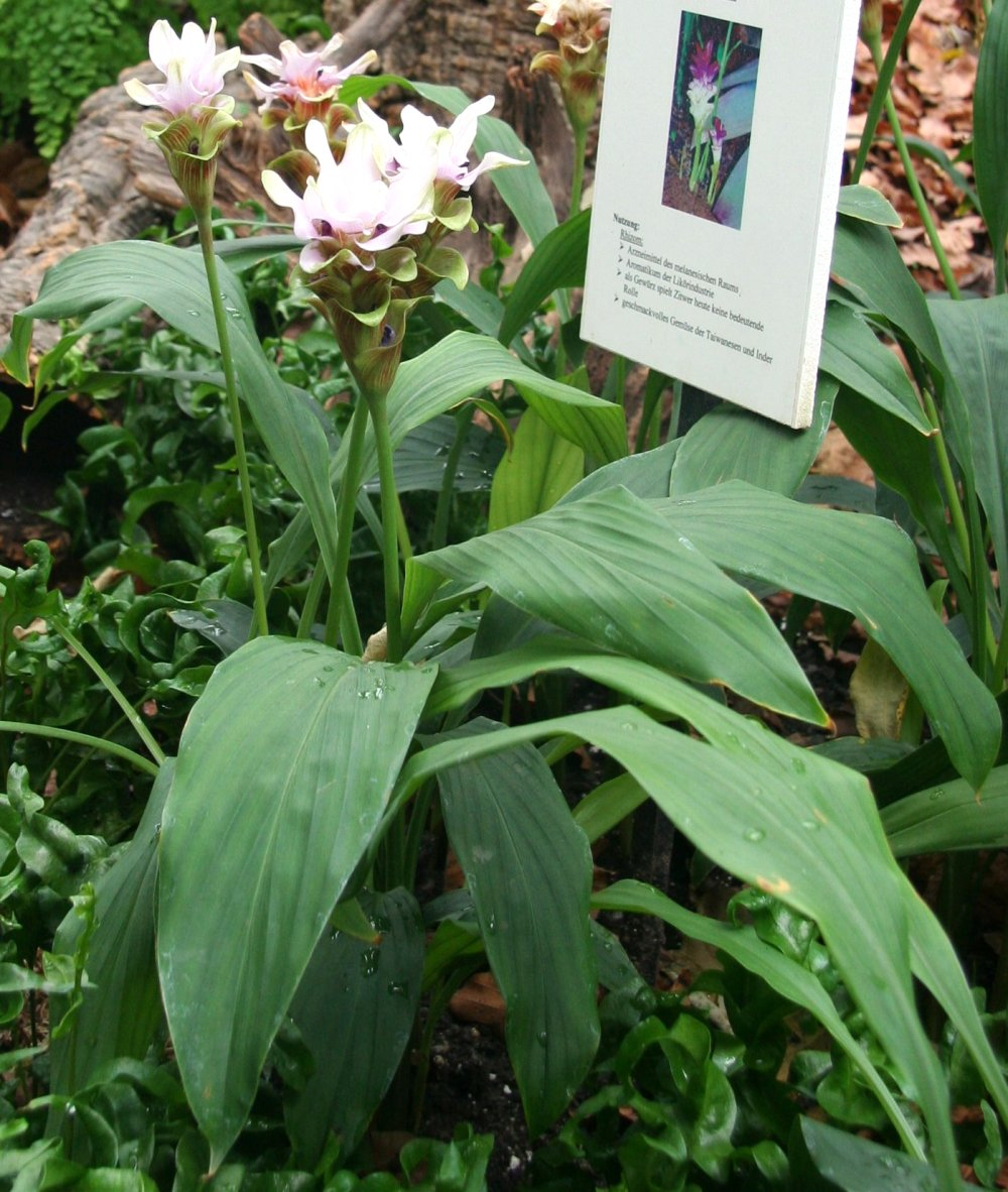 Habitus von Curcuma zedoaria